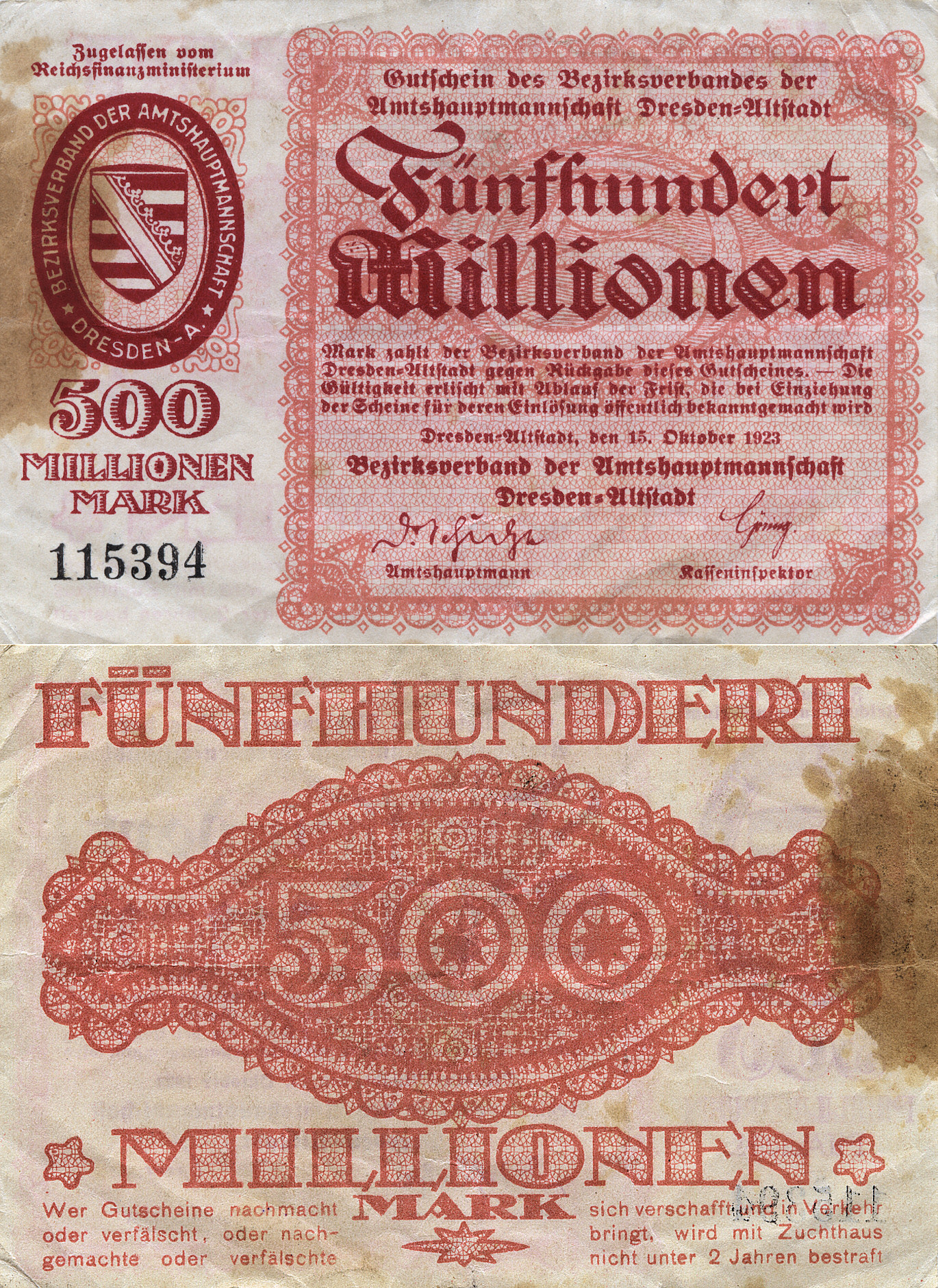 500.000.000 Mark, Dresden Altstadt, 1923